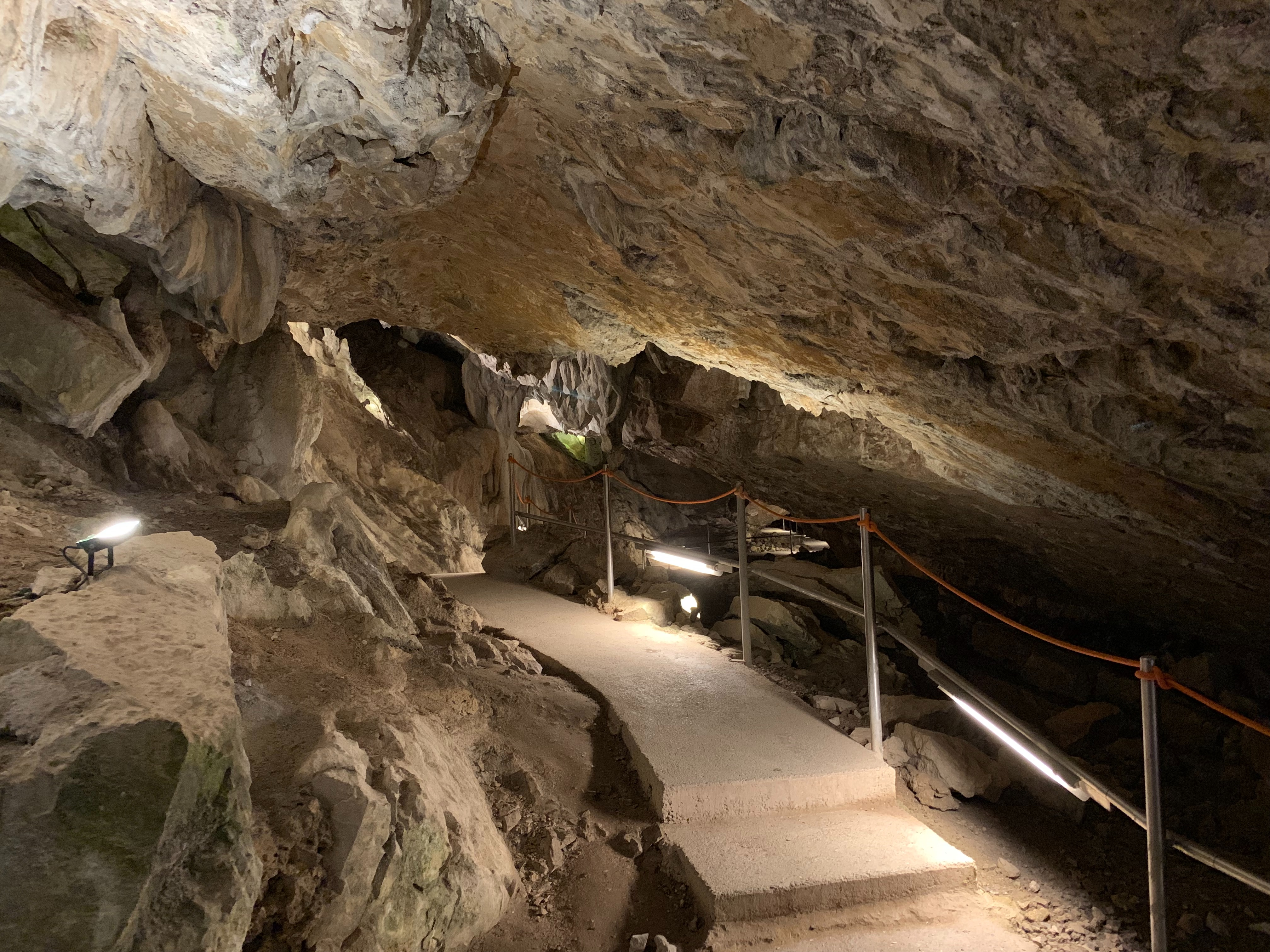 Cueva de las Güixas, Villanúa, Agosto 2019